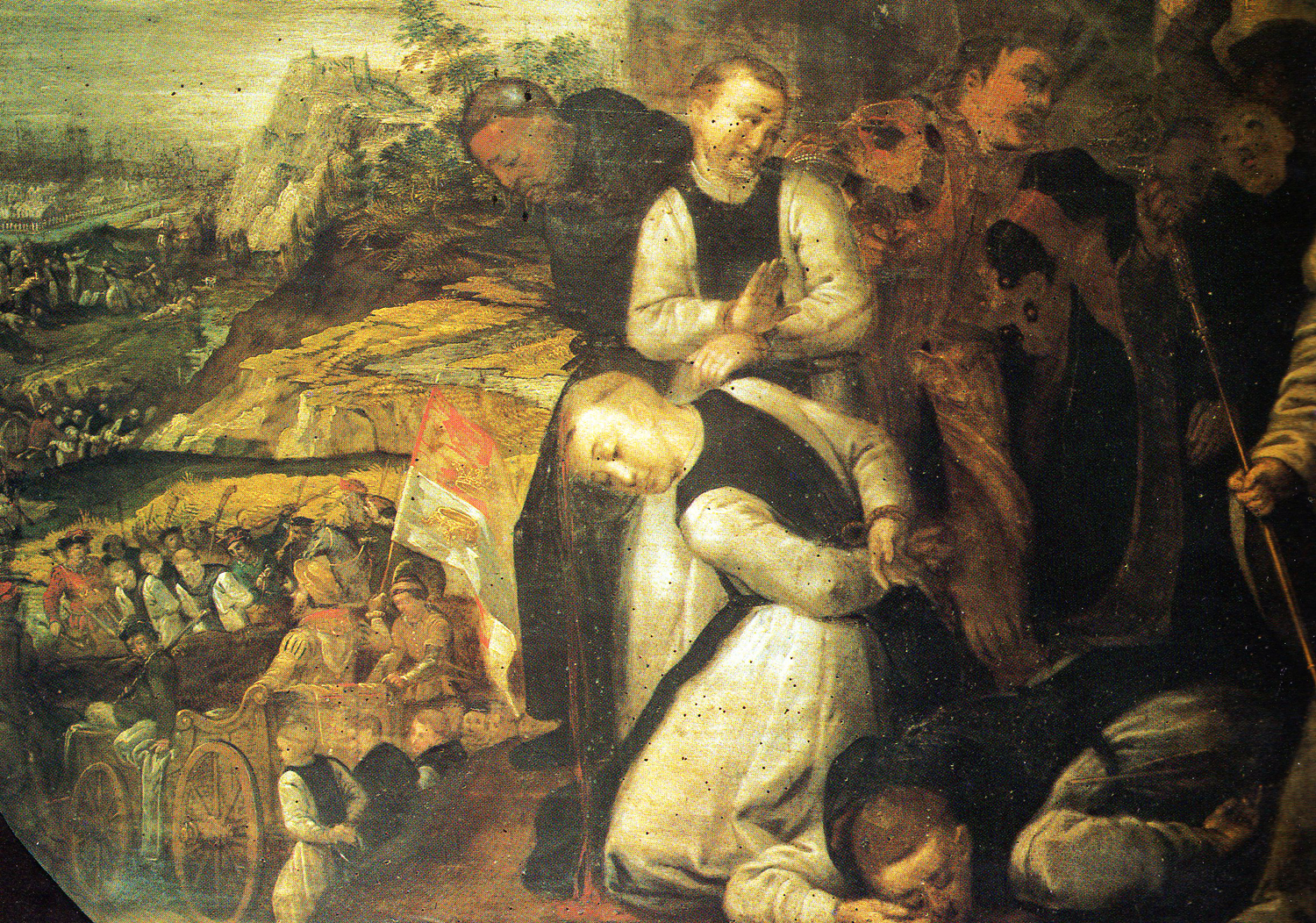 detail